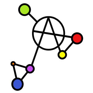 Propuesta de símbolo alternativo para Anarquía Relacional. Basado en una visión de la anarquía relacional que implica necesariamente un cambio en la organización social, en la forma que se estructuran todas las relaciones sociales y no sólo en su aspecto afectivo.